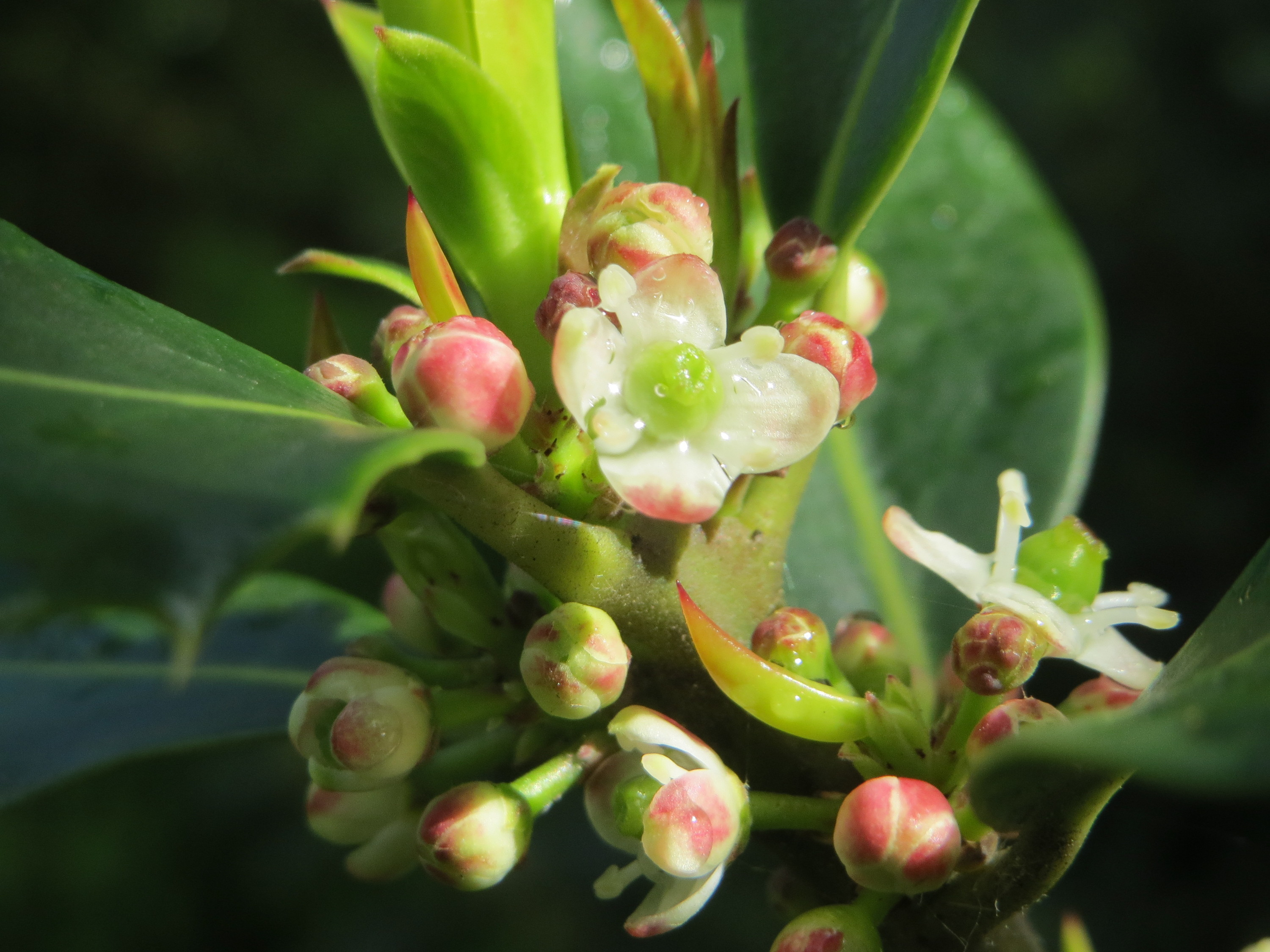 Amerikanische Stechpalme (Ilex opaca) am Staden in Saarbrücken